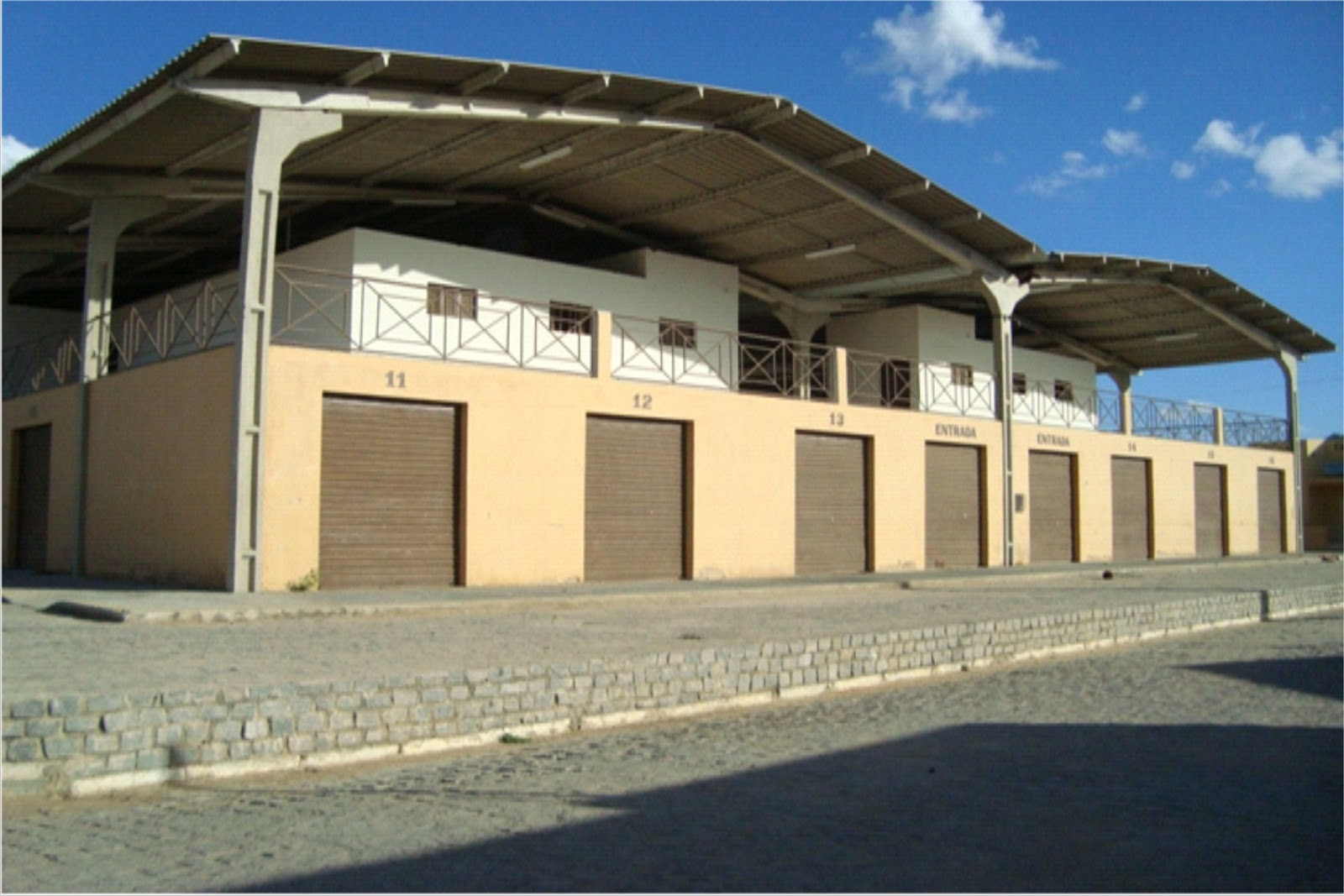 As feiras livres são realizadas aos domingos.